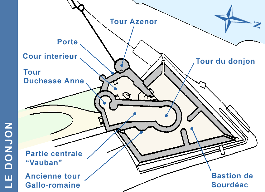 Dessin du donjon du chateau de Brest